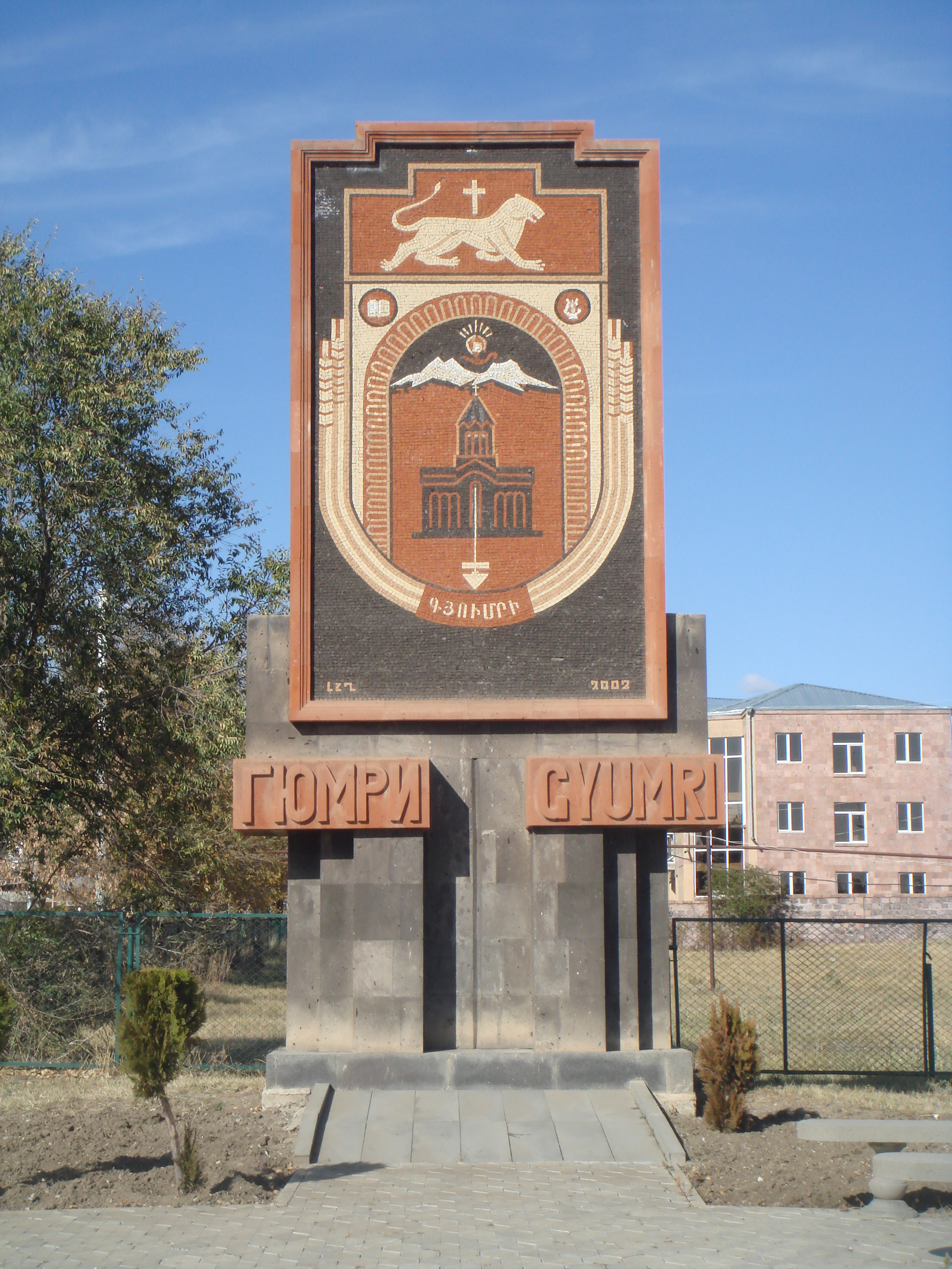 The statue of Gyumri's Coat of arms situated near the entrance to the city.